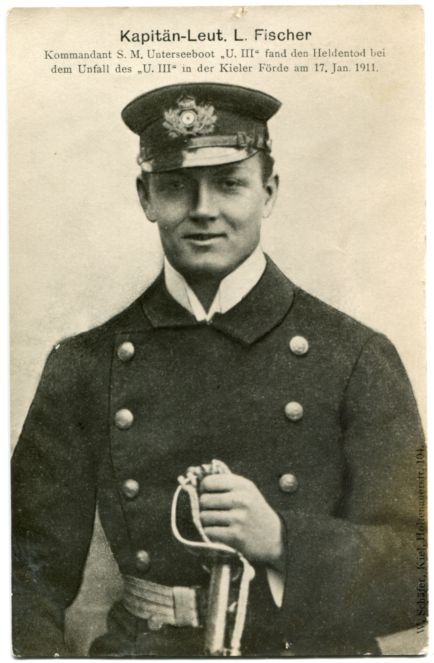 Капитан-лейтенант Фишер, почтовая открытка.